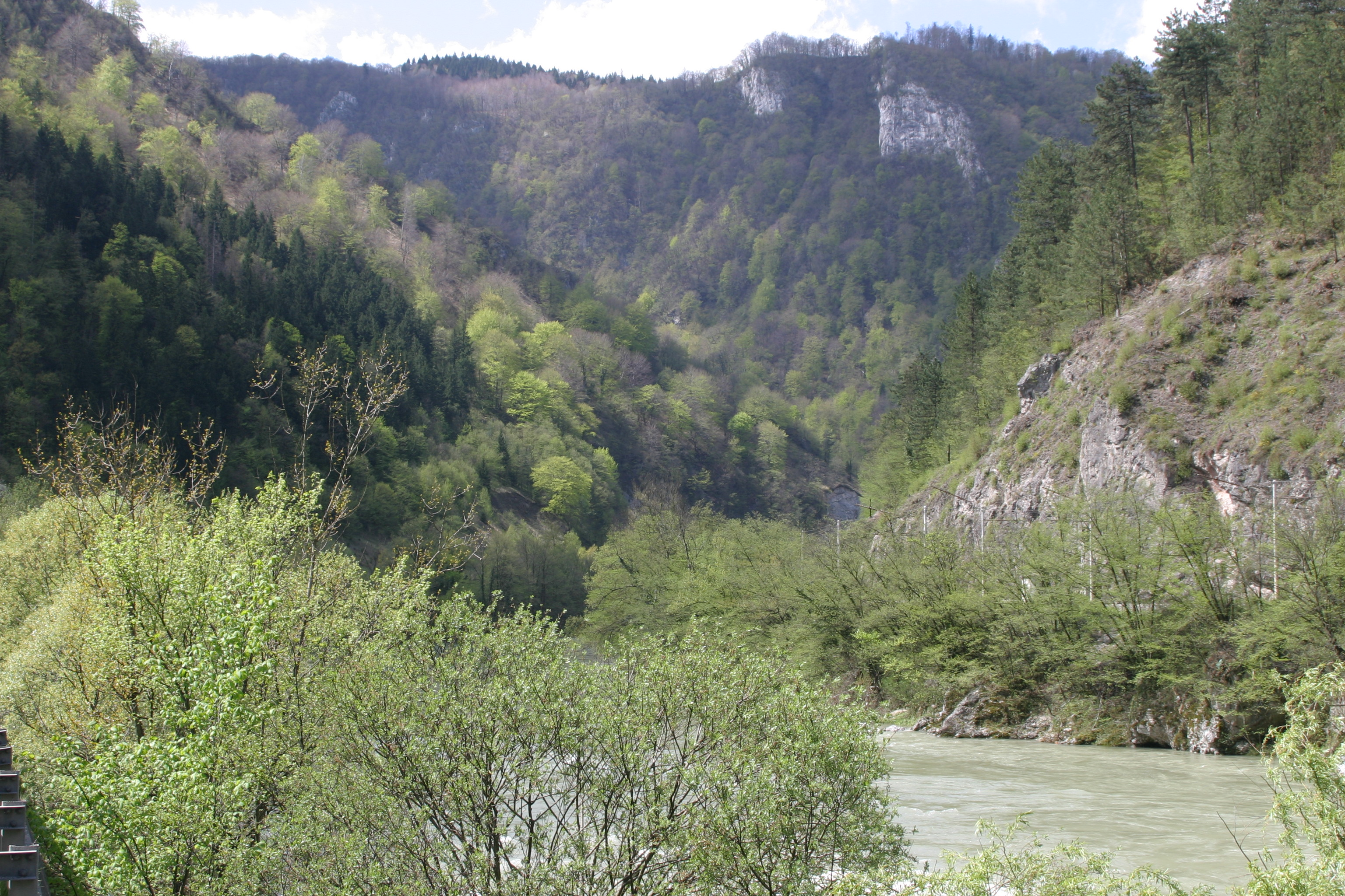 Soteska Save med Zagorjem in Trbovljami.